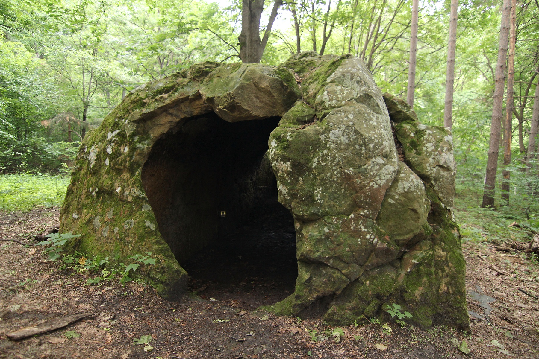 Schitul rupestru Fundătura 01